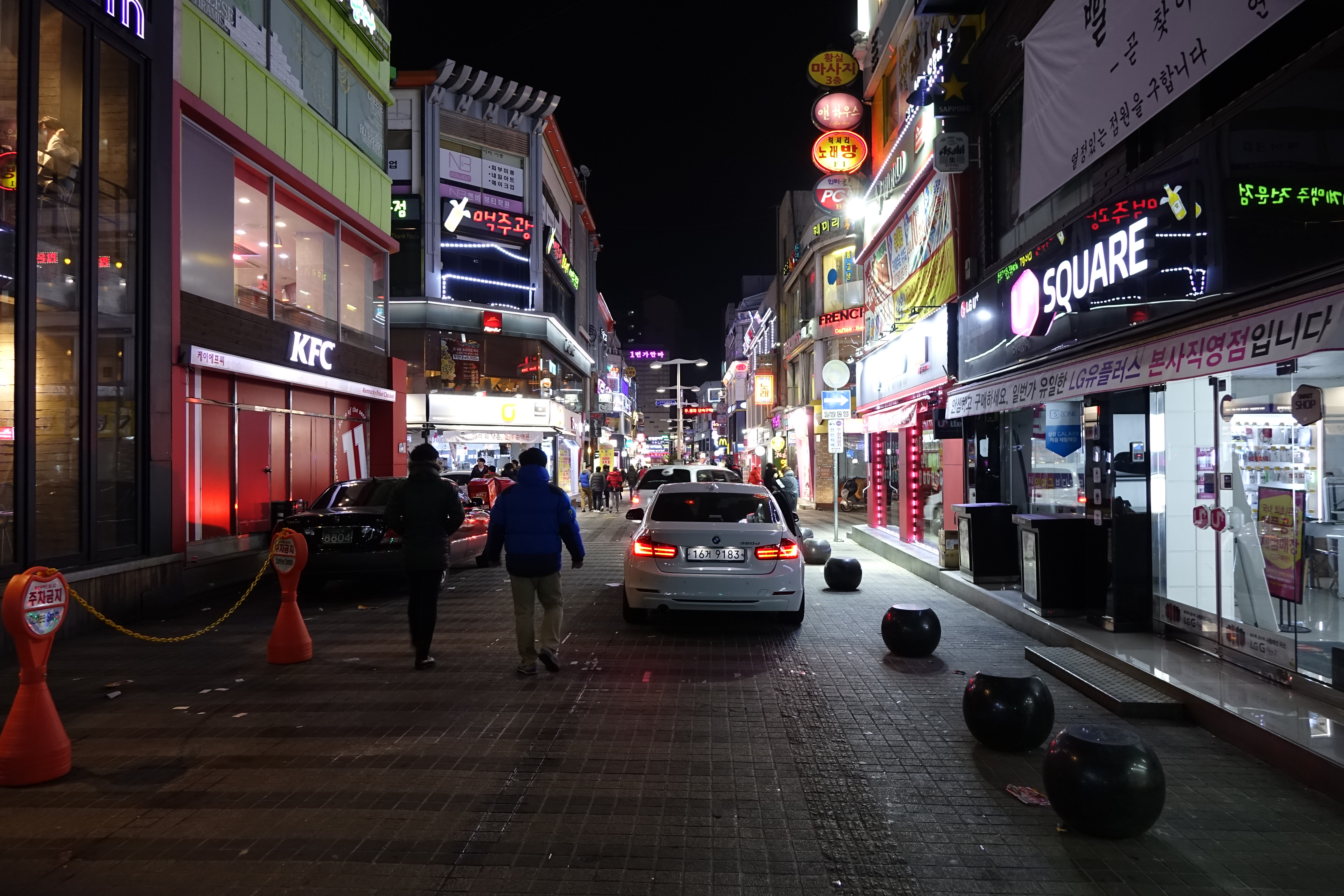 안양1번가, 2015년 2월 경기도 안양시